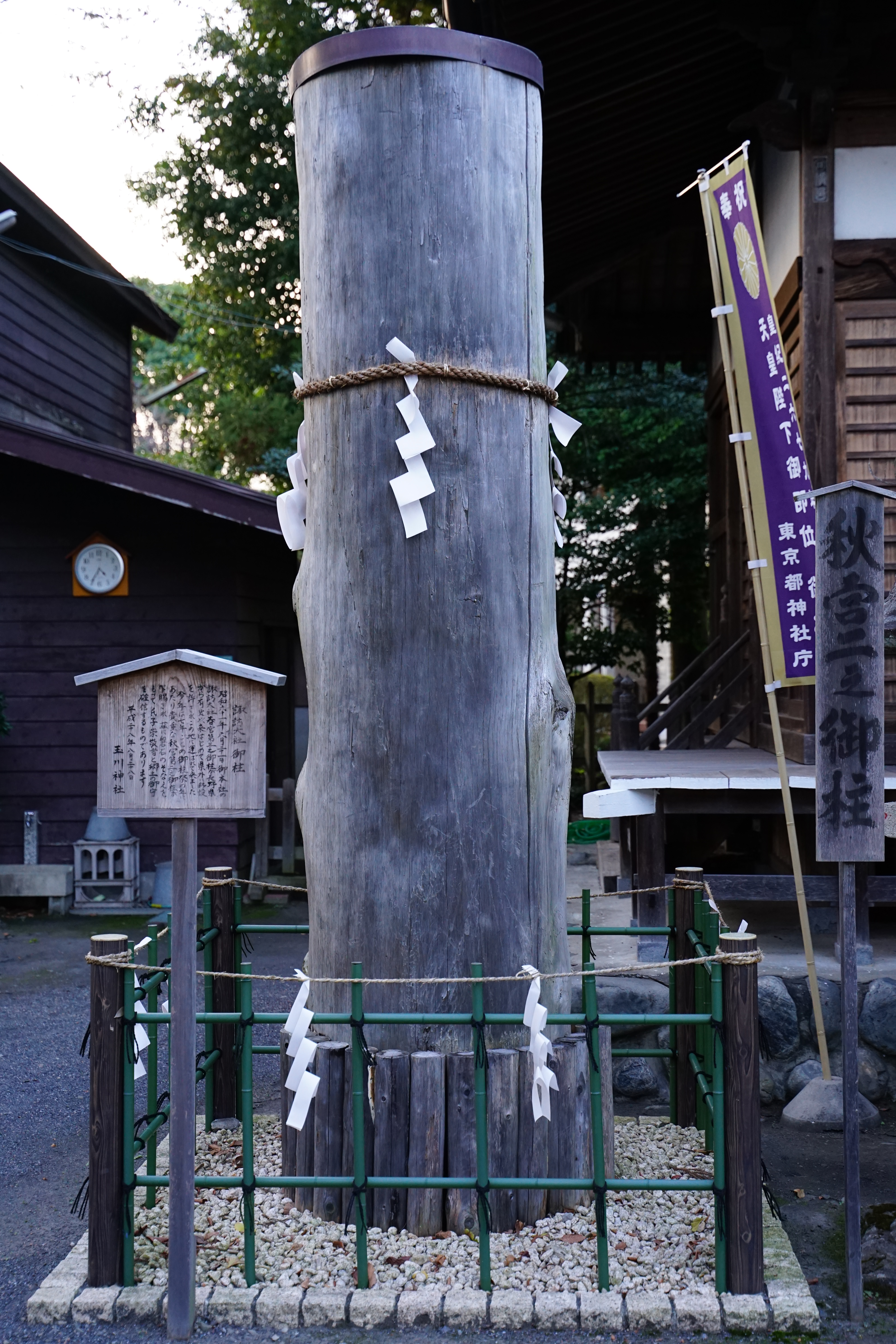 玉川神社の諏訪大社御柱（東京都羽村市）